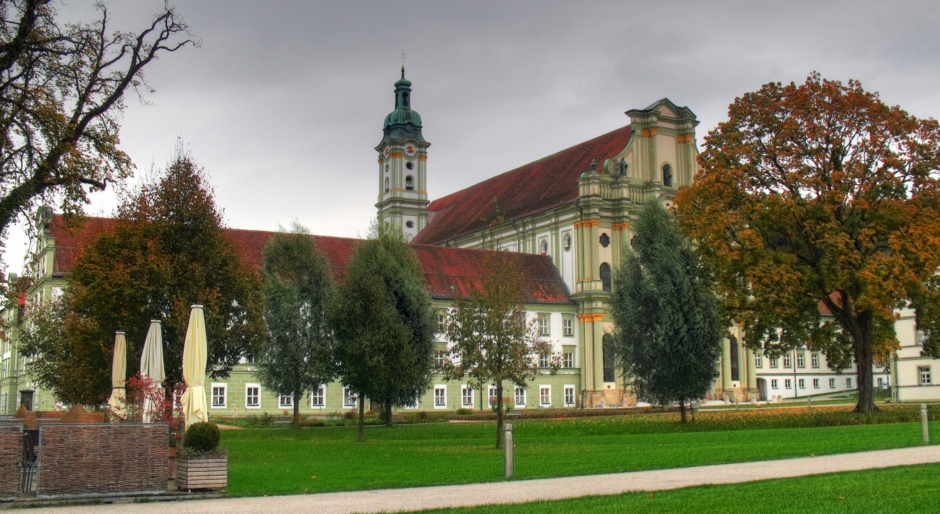 Deutschland, Bayern, Fürstenfeldbruck, Kloster Fürstenfeld, ehem. Klosterkirche St. Mariä Himmelfahrt, Tone-mapped HDR-Bild